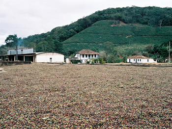 café secando em terreiro de cimento em fazenda de Alto Jequitibá (MG)